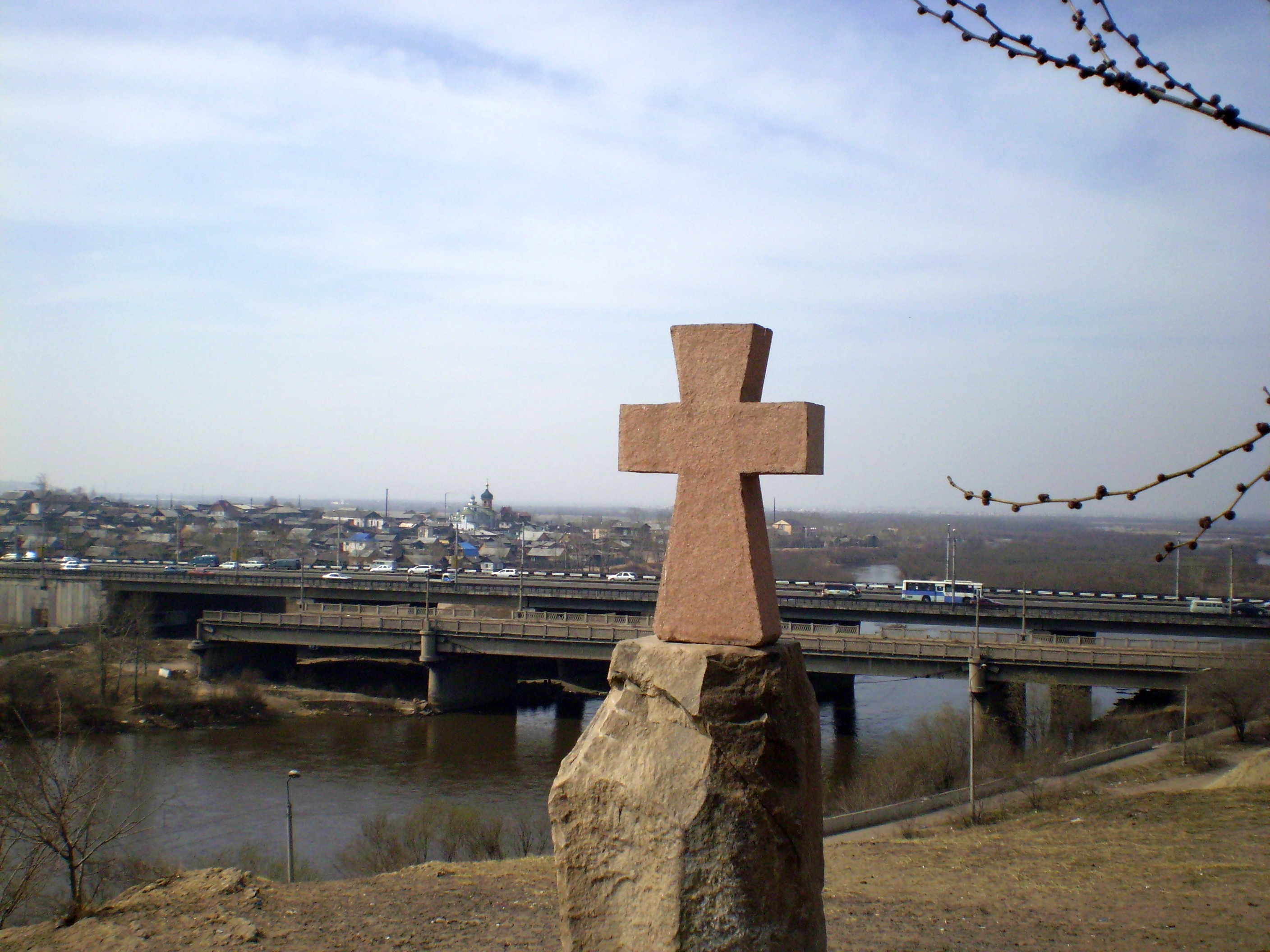 Место Удинского острога